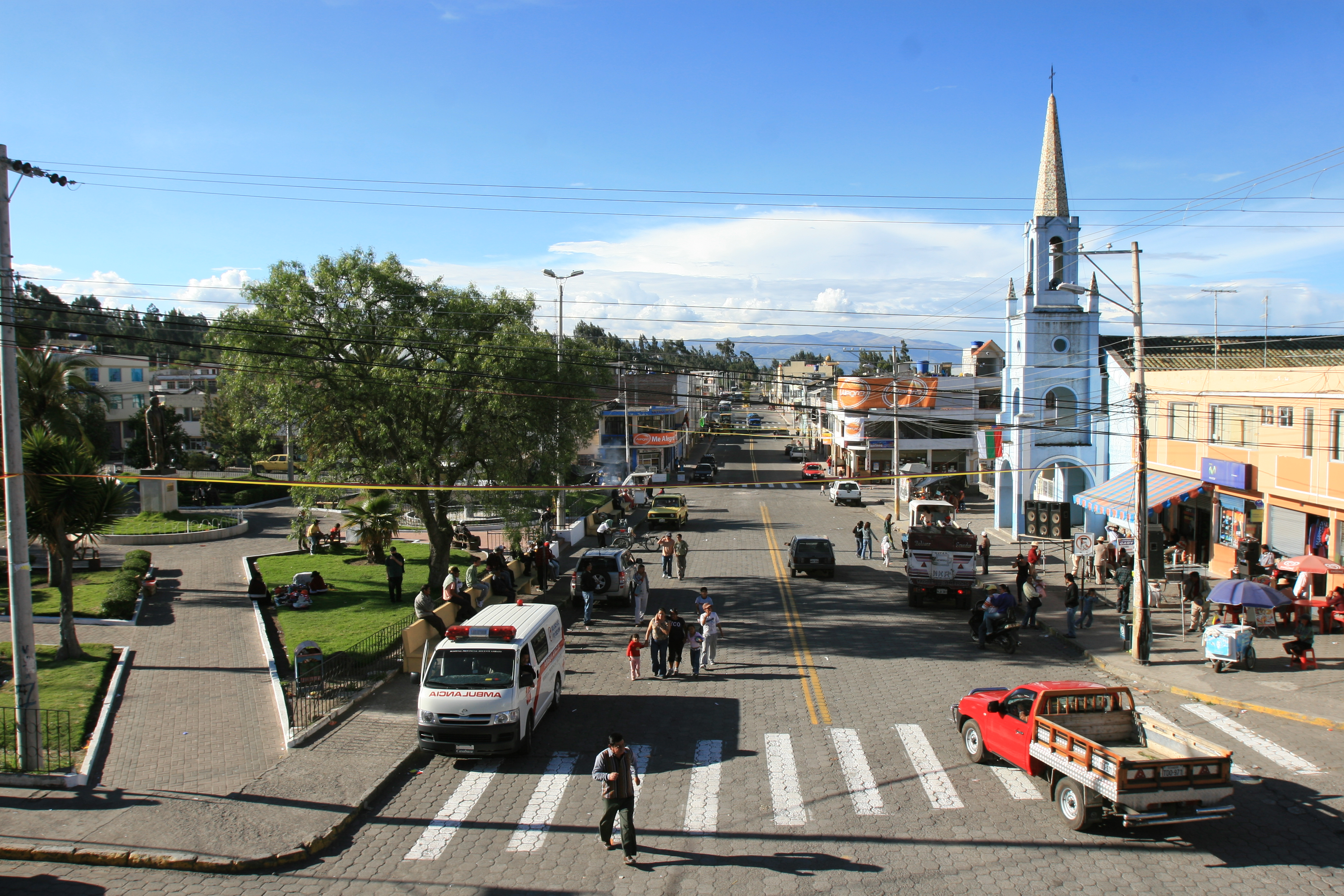 Parque central de Cevallos, prov Tungurahua